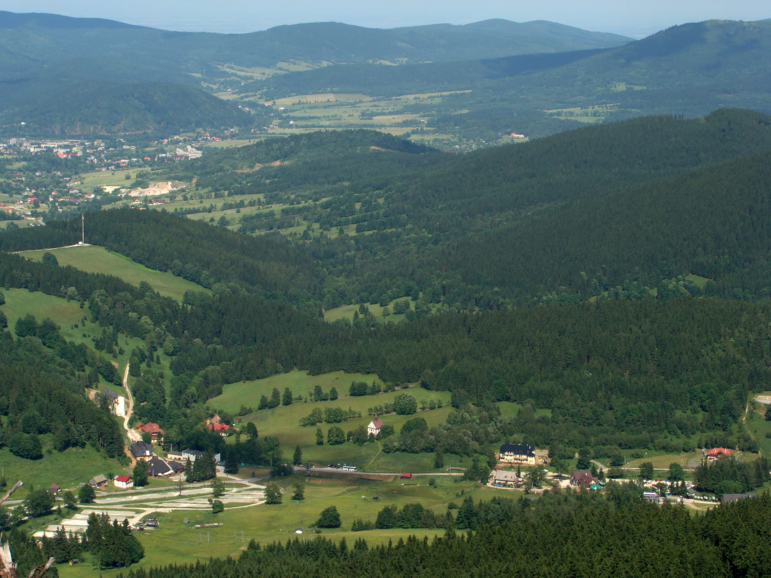 Widok ze szczytu Czarnej Góry